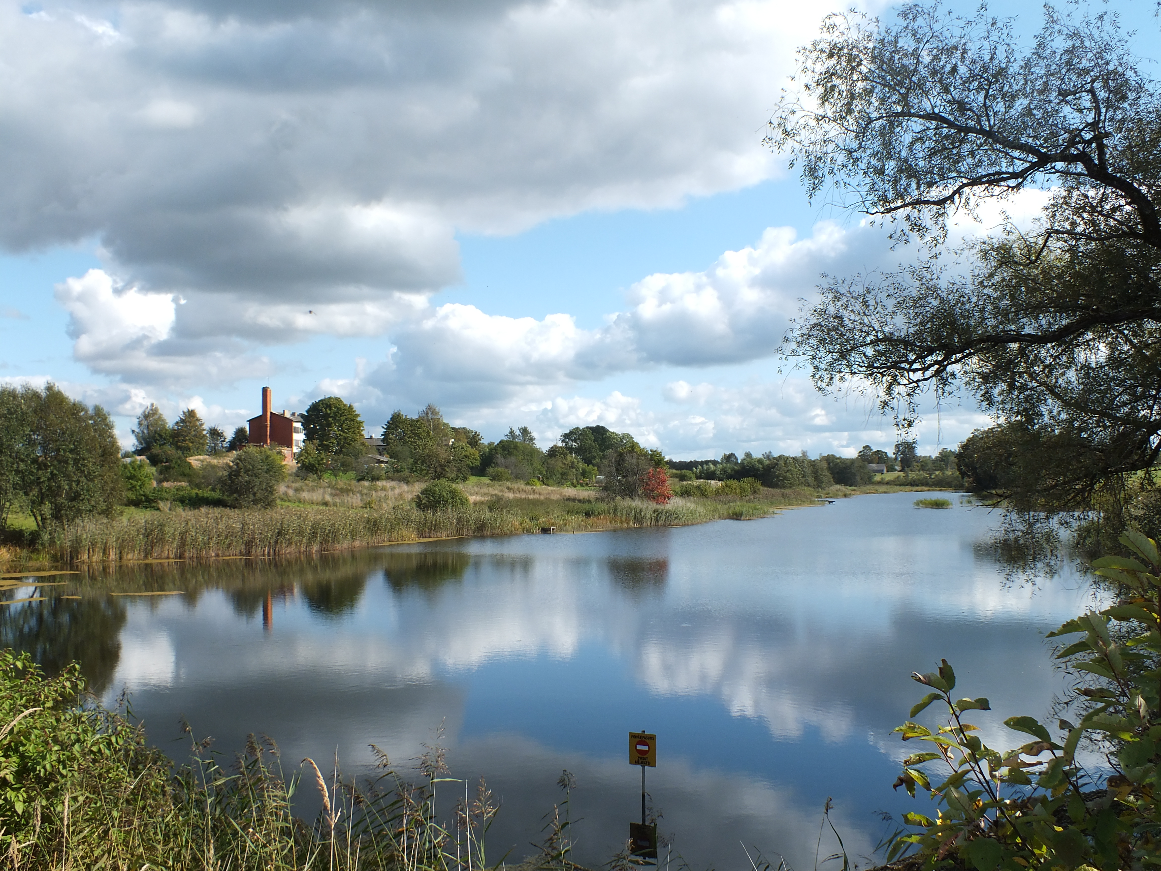 Dīķis uz Širmeļupītes